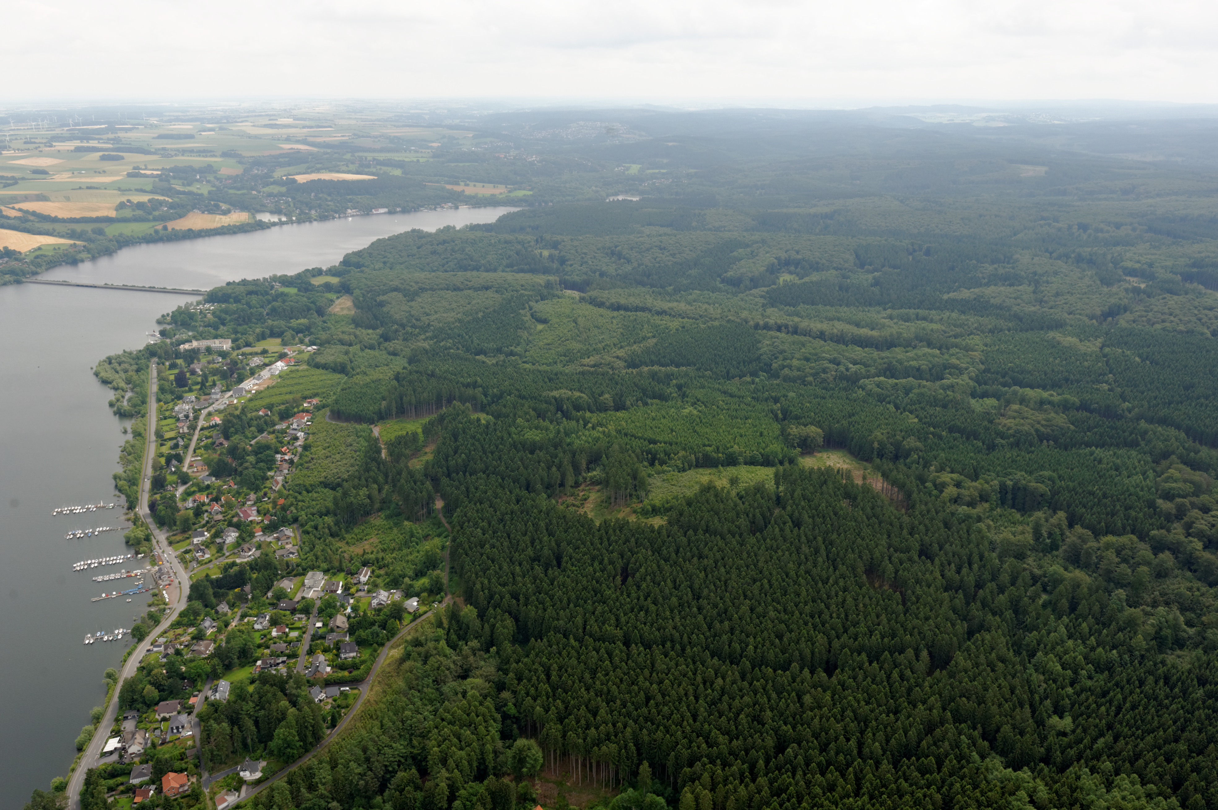 Fotoflug Sauerland Nord. Möhnesee mit Teil von Körbecke am Südufer und Körbecker Mark des Arnsberger Waldes The making of this document was supported by the Community-Budget of Wikimedia Germany.